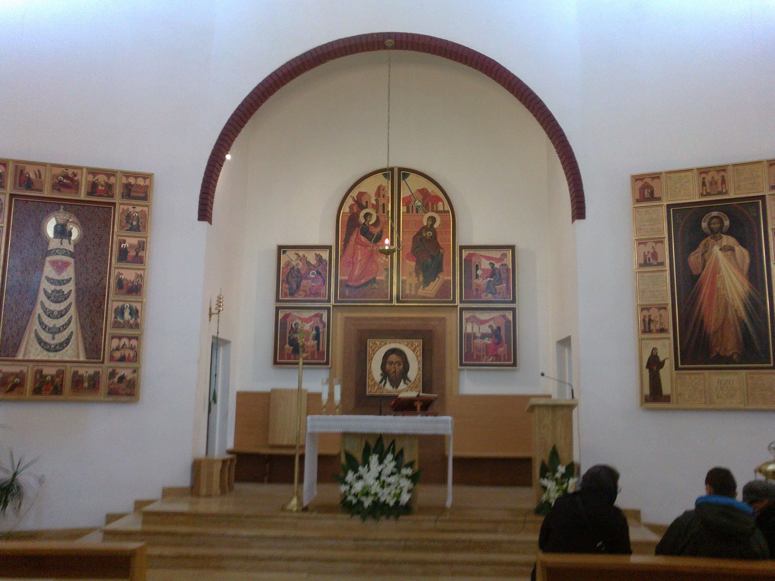 Kościół MB Loretańskiej w Kuligowie (gm. Dąbrówka, pow. Wołomin)